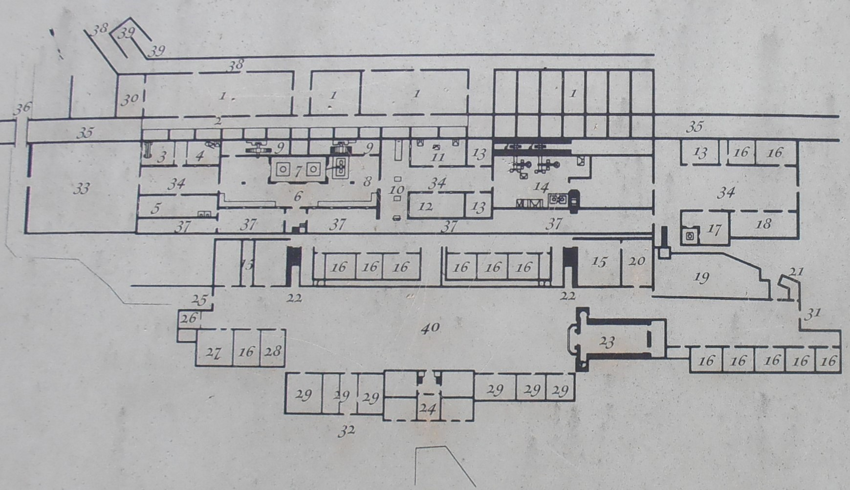 Orbaizetako olaren planoa: 1.- Ikaztegiak; 2.- Ikaztegien pasabidea; 3.- Munizioen aztergunea; 4.- Munizioen garbitegia; 5.- Buztinezko moldeak egiteko tailerrak; 6.- Labe eraikina; 7.- Galdaketa labeak; 8.- Haize makinak; 9.- Gurpil hidraulikoak; 10.- Ubidea eta bokartea; 11.- Sarraila-tailerrak; 12.- Zurgindegia; 13.- Biltegiak; 14.- Gabien I. eraikina; 15.- Mea biltegia; 16.- Etxebizitzak; 17.- Santa Barbara labea; 18.- Gabien II. eraikina; 19.- Baratzea; 20.- Eskola; 21.- Komunak; 22.- Eskailerak; 23.- Eliza; 24.- Jauregia; 25.- Aezkoako atea; 26.- Ogi labea; 27.- Ostatua; 28.- Kaserna; 29.- Ofizialen etxebizitzak; 30.- Hilerria; 31.- Auritzeko atea; 32.- Frantziako atea; 33.- Munizioen plaza; 34.- Etxarteak; 35.- Legartza erreka; 36.- Aezkoako bideko zubia; 37.- Tailerretako korridoreak; 38.- Ikaztegietarako bidea; 39.- Deskargatzeko arrapala; 40.- Plaza